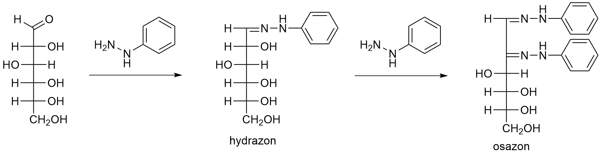 Tvorba hydrazonu a osazonu z D-glukosy.